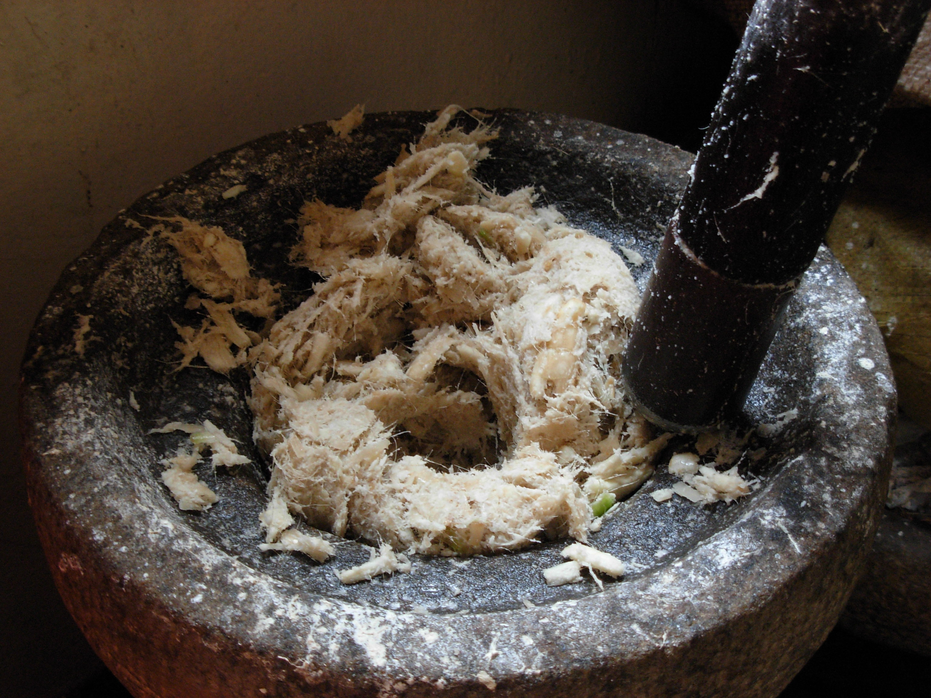 കൂവക്കിഴങ്ങ് ഉരലിൽ ഇടിച്ചെടുക്കുന്നു.